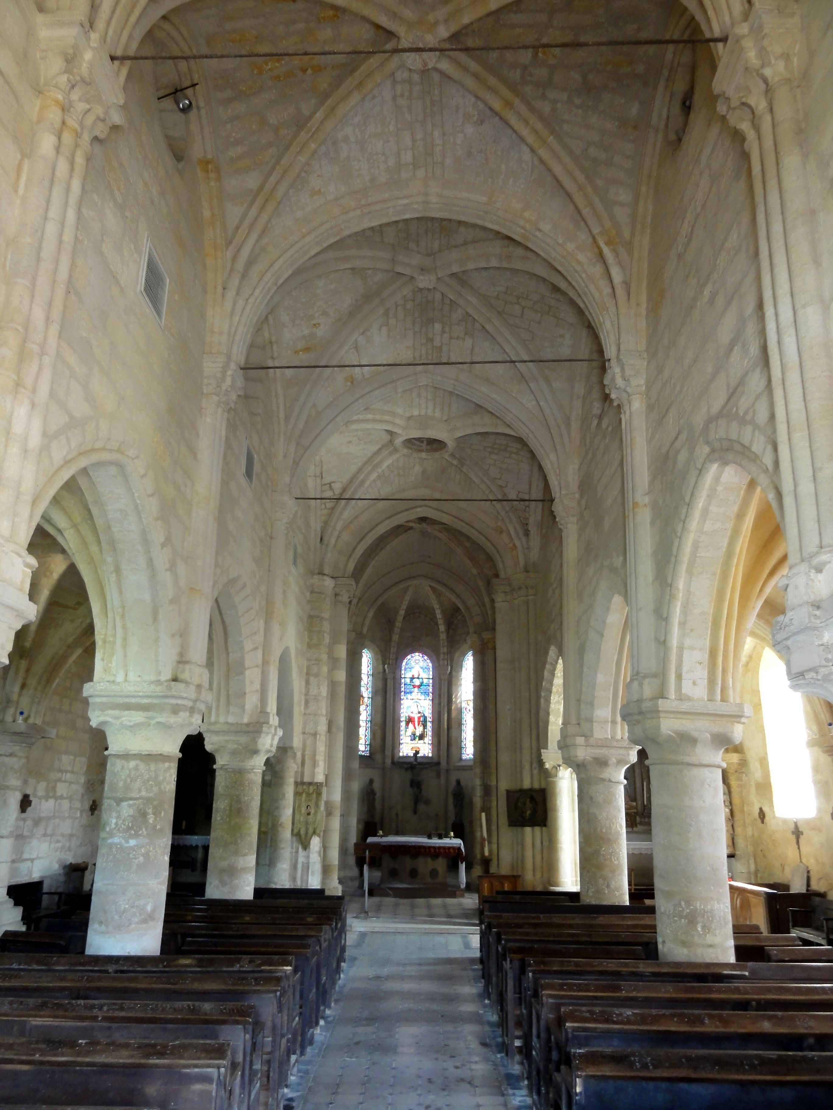 Vue générale intérieure.